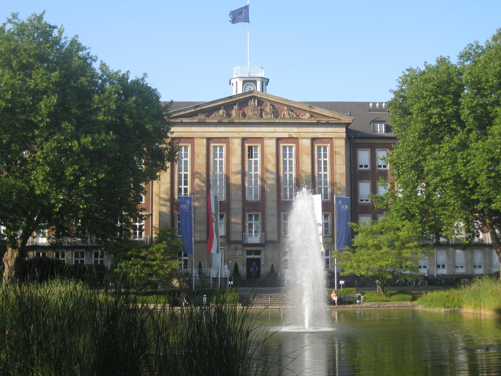 Ehemaliges Standort Lazarett erbaut von Architekt Hans Ostermann in Münster 1937